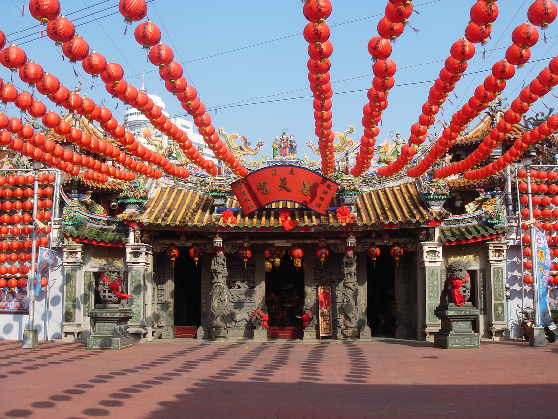 梧棲大庄浩天宮